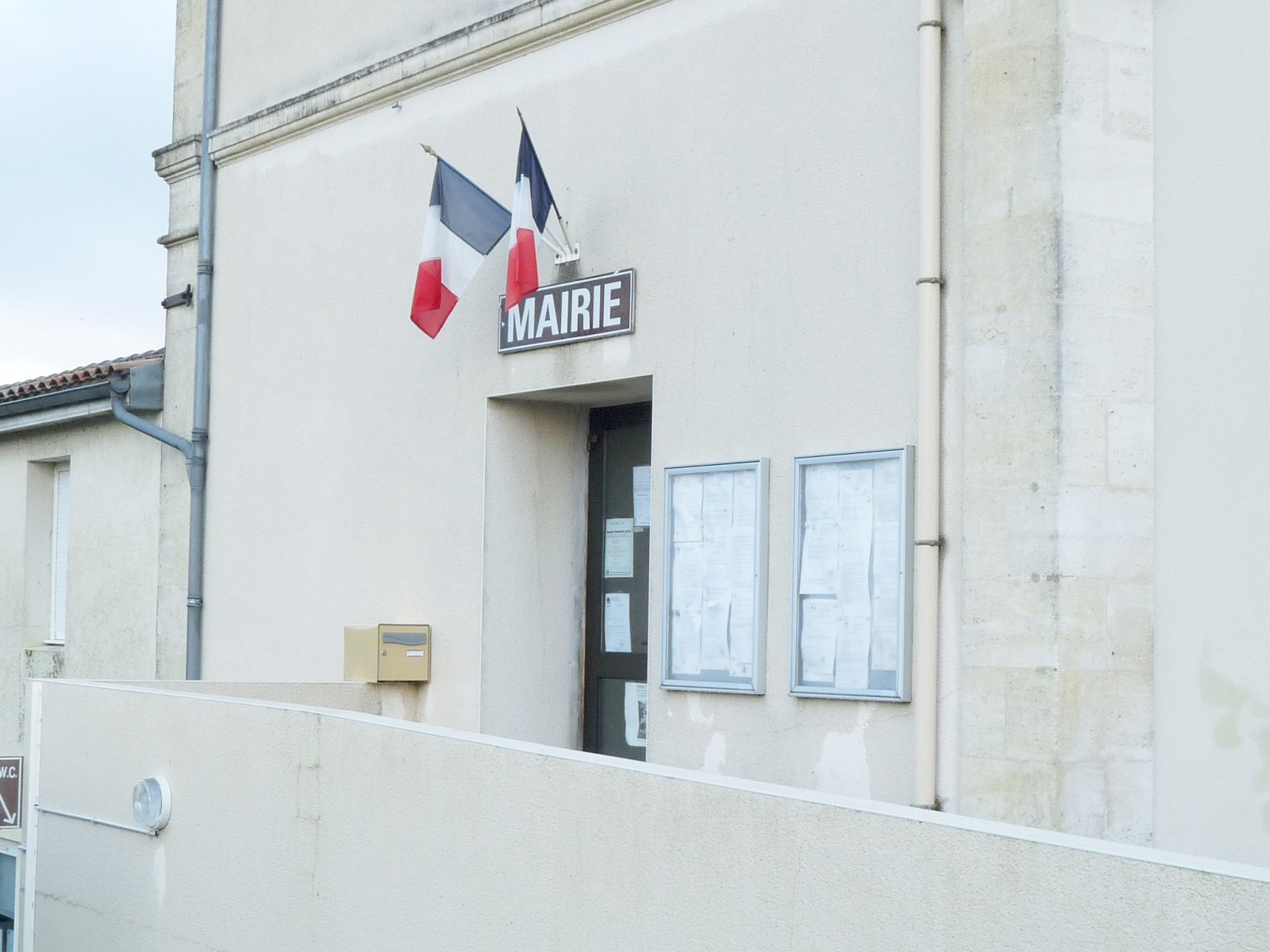 Mairie de Soubran, Charente-Maritime, France